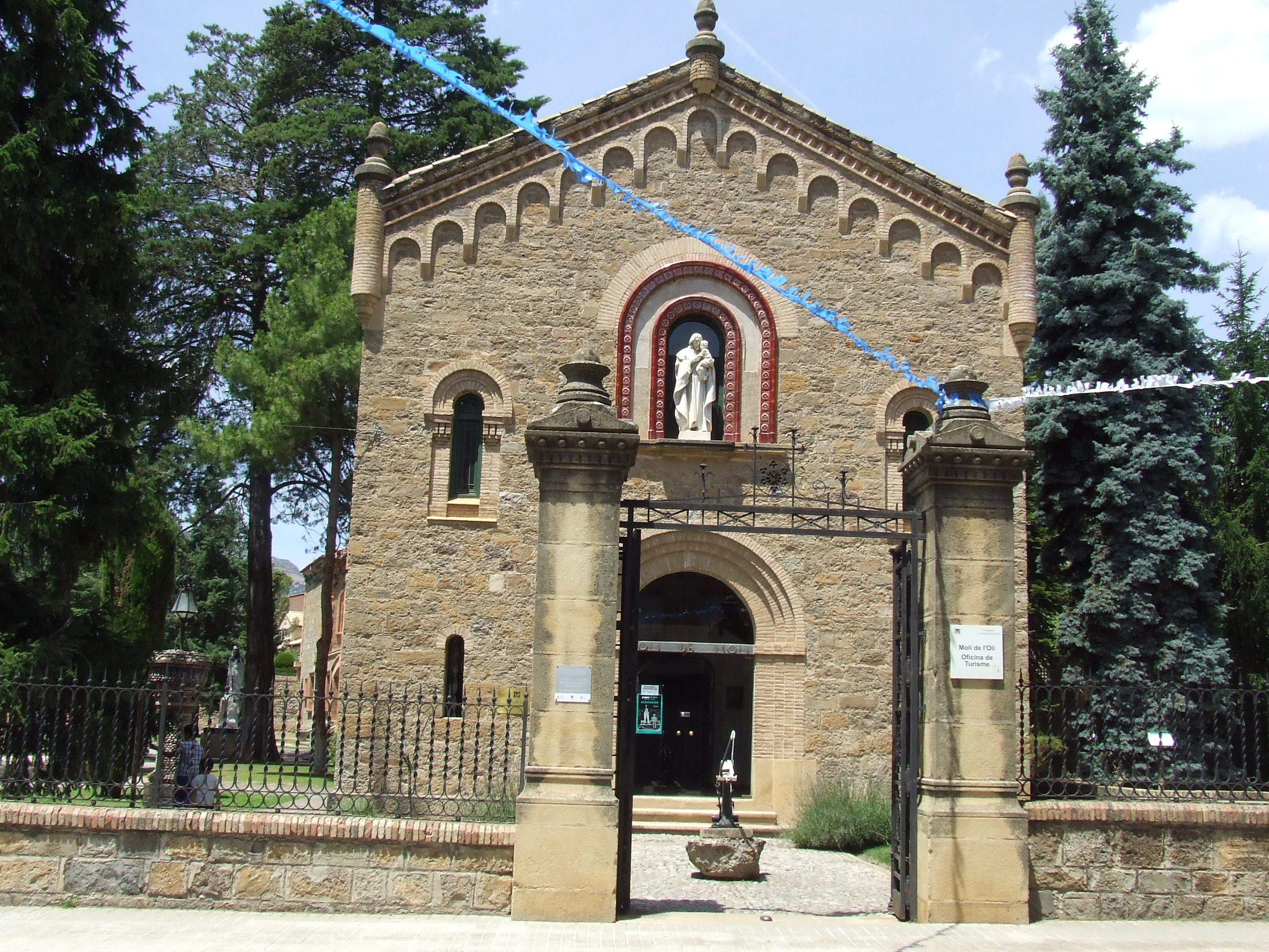 El Molí d'oli de Casa Mauri (la Pobla de Segur, Pallars Jussà)